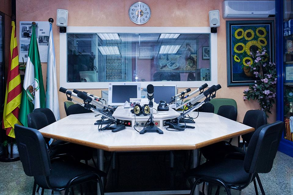 Un dels estudis de gravació de Radio Unión Catalunya